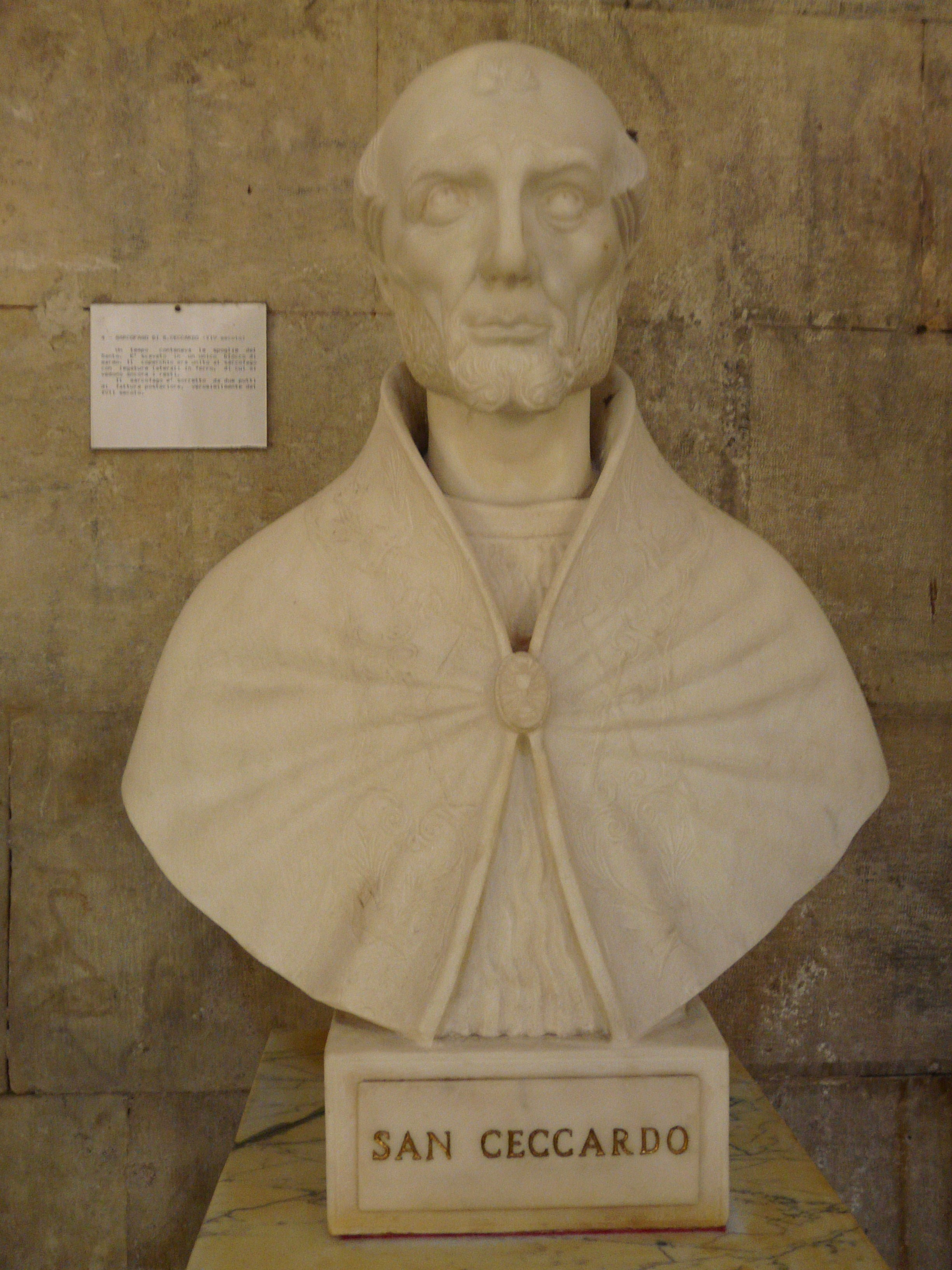 Busto di San Ceccardo della cattedrale di Carrara, Toscana, Italia